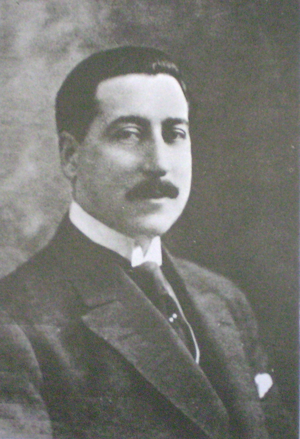 Robustiano Patrón Costa